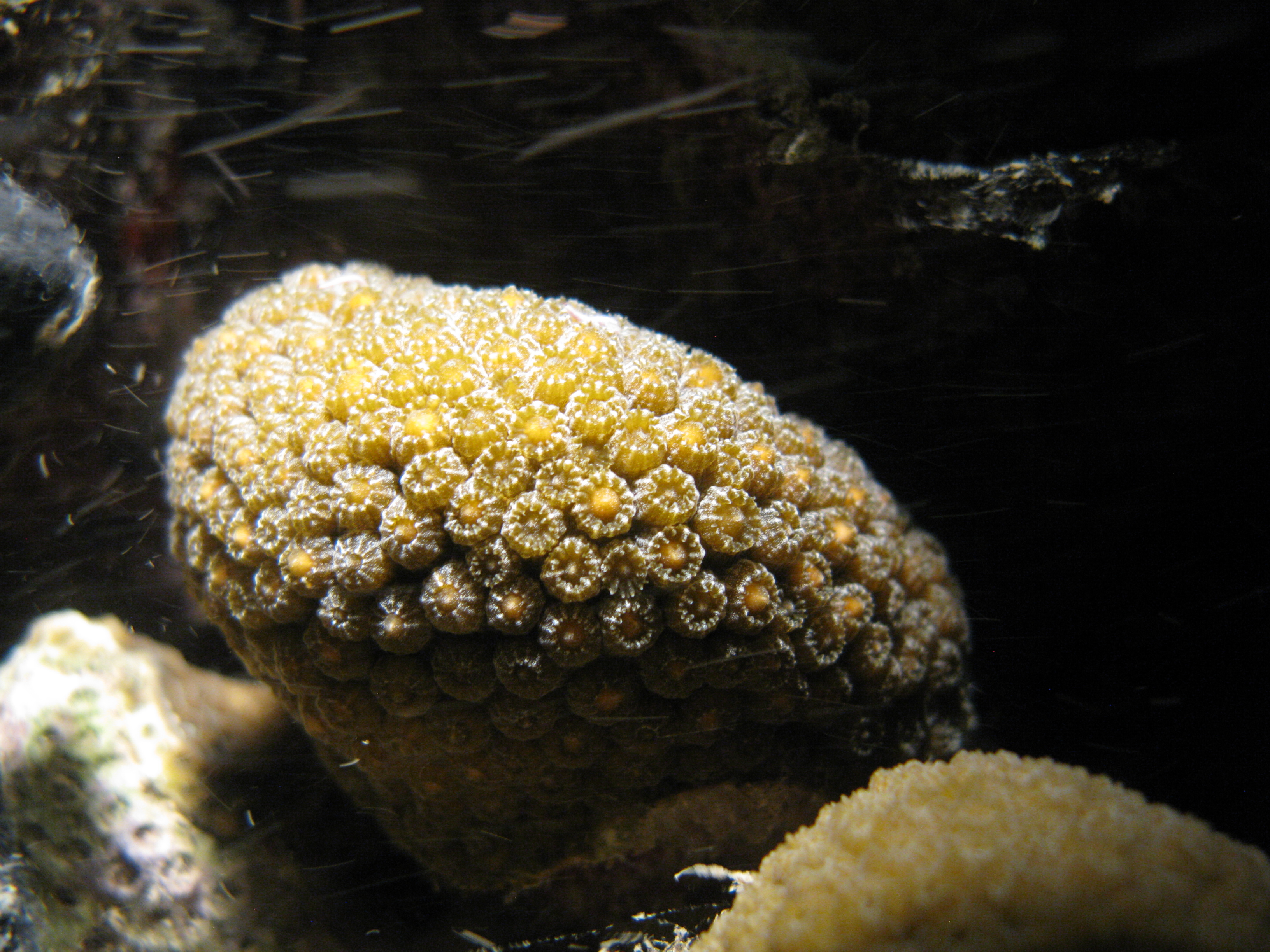 Fotografía de desove de corales en la región de Barú, en el Caribe Colombiano